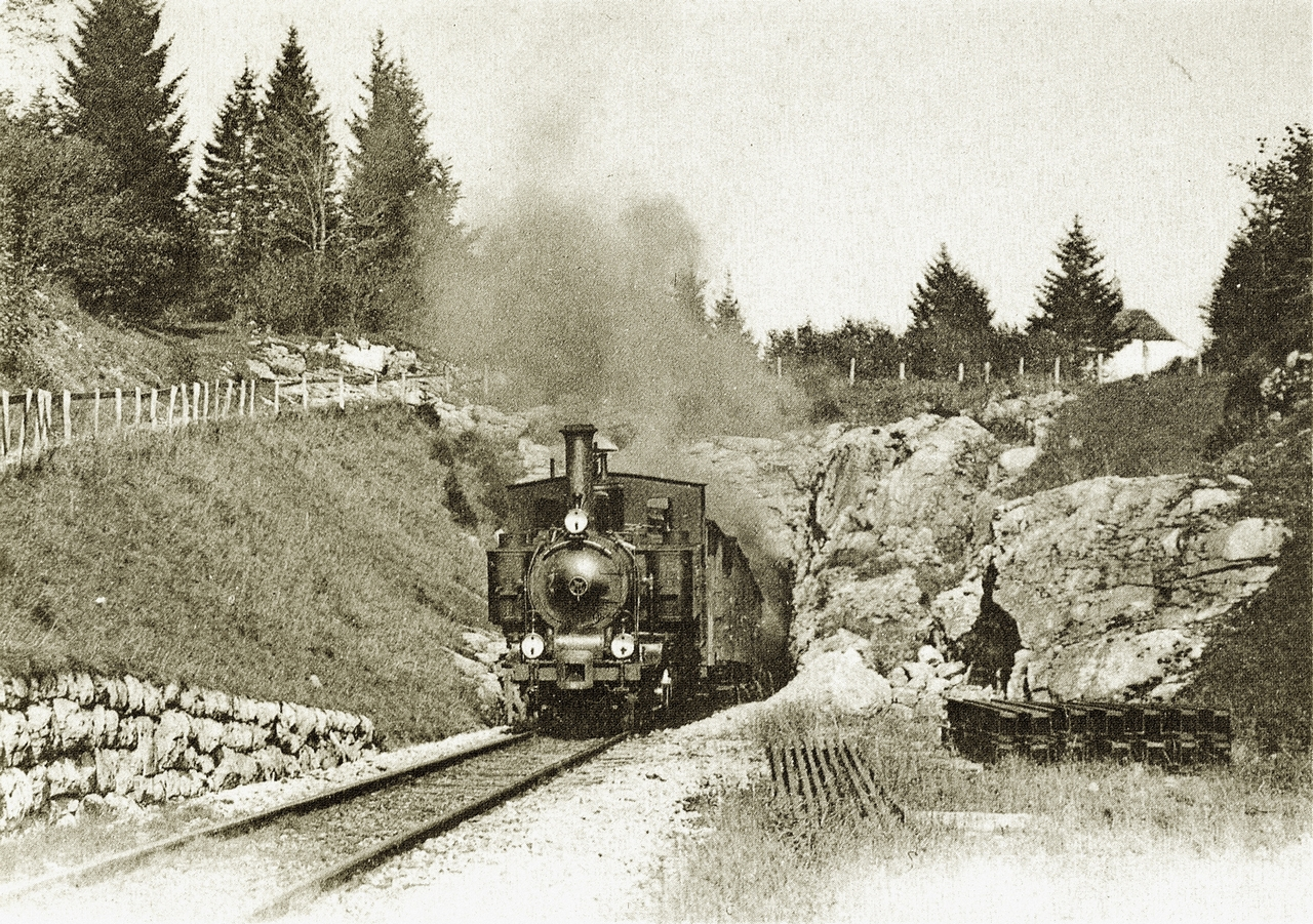 Erste Brünig-Berglokomotive HG 2/2 für gemischten Adhäsions-und Zahnradbetrieb, erbaut 1888 von der Schweizerischen Lokomotiv- und Maschinenfabrik (SLM) in Winterthur